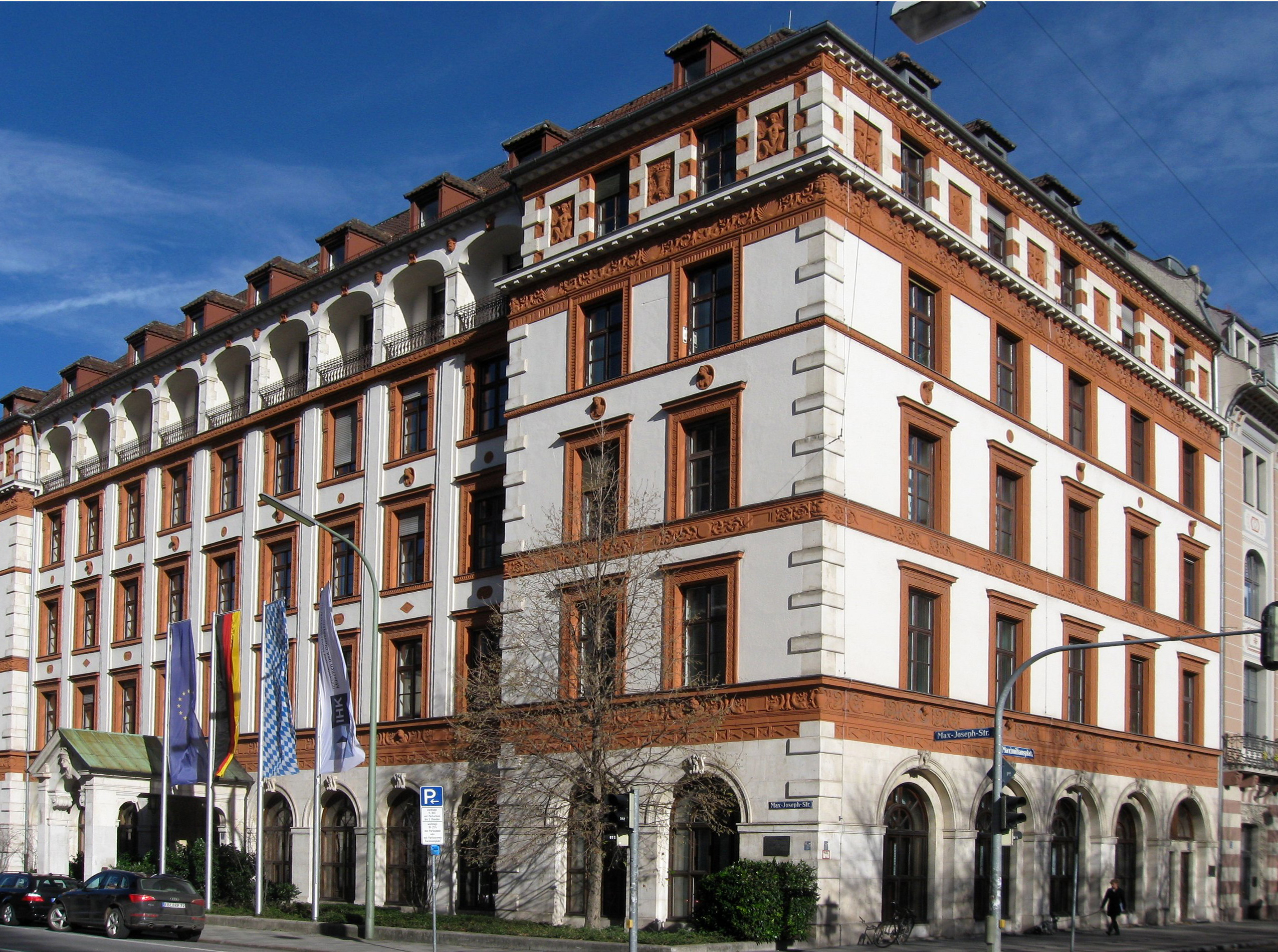 Max-Joseph-Straße 2; Ehem. Wohn- und Geschäftshaus A. S. Drey, jetzt Industrie-und Handelskammer, dreiseitig freistehender historisierender Bau, 1911-12 von Gabriel von Seidl; mit reichem plastischem Dekor (Terrakottafriese von Franz Naager, Figuren von Heinrich Düll und Georg Pezold); bildet mit Maximiliansplatz 8 (siehe dort) einen Block.